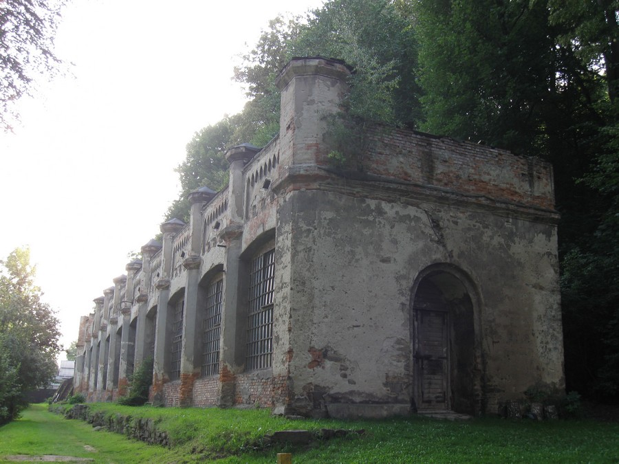 oranżeria